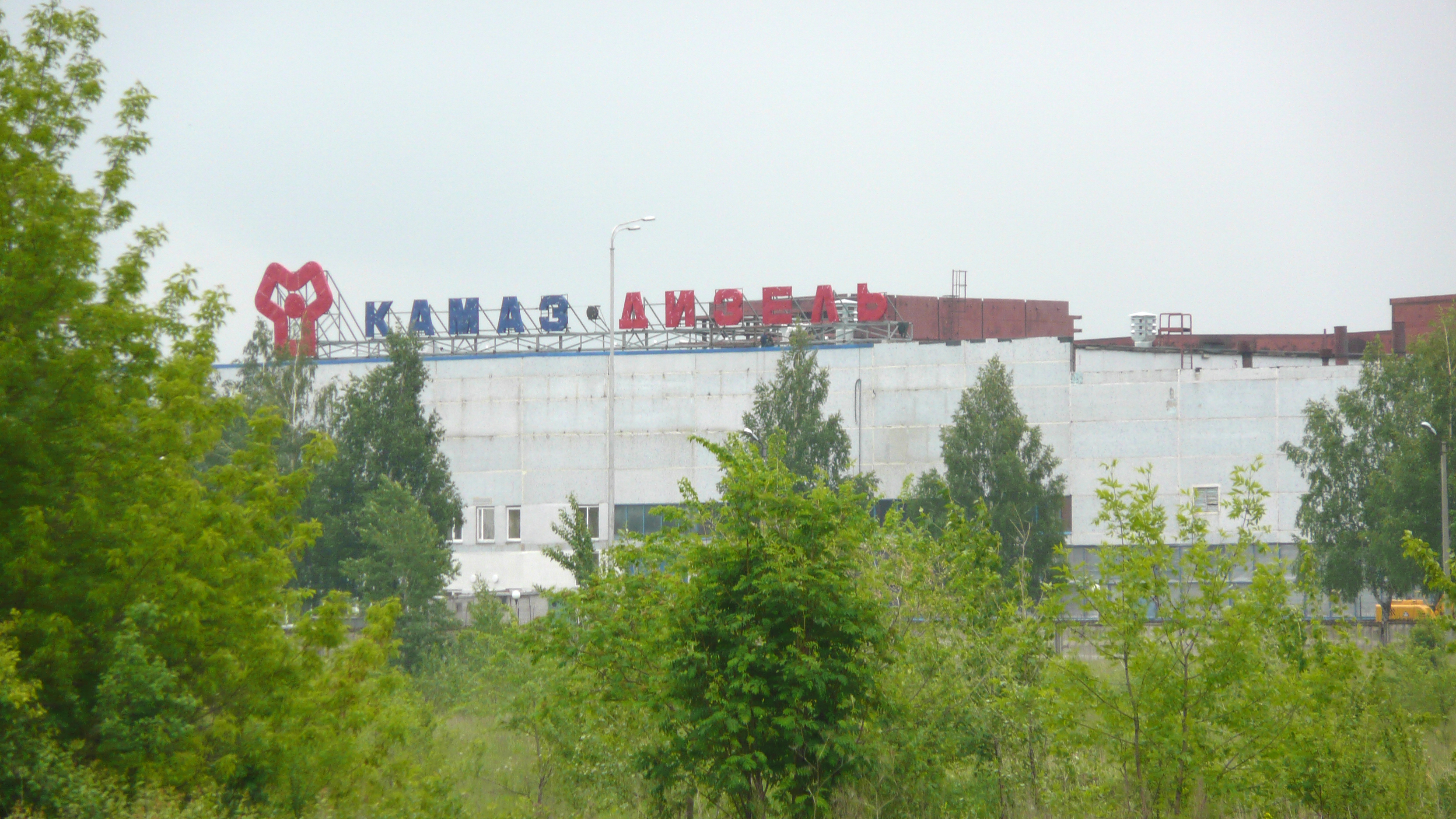 Kamaz Disel in Naberezhnye Tchelny